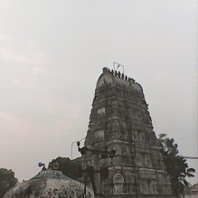 మండపం మరియు గాలి గోపురం భావన్నారాయణ స్వామి వారి